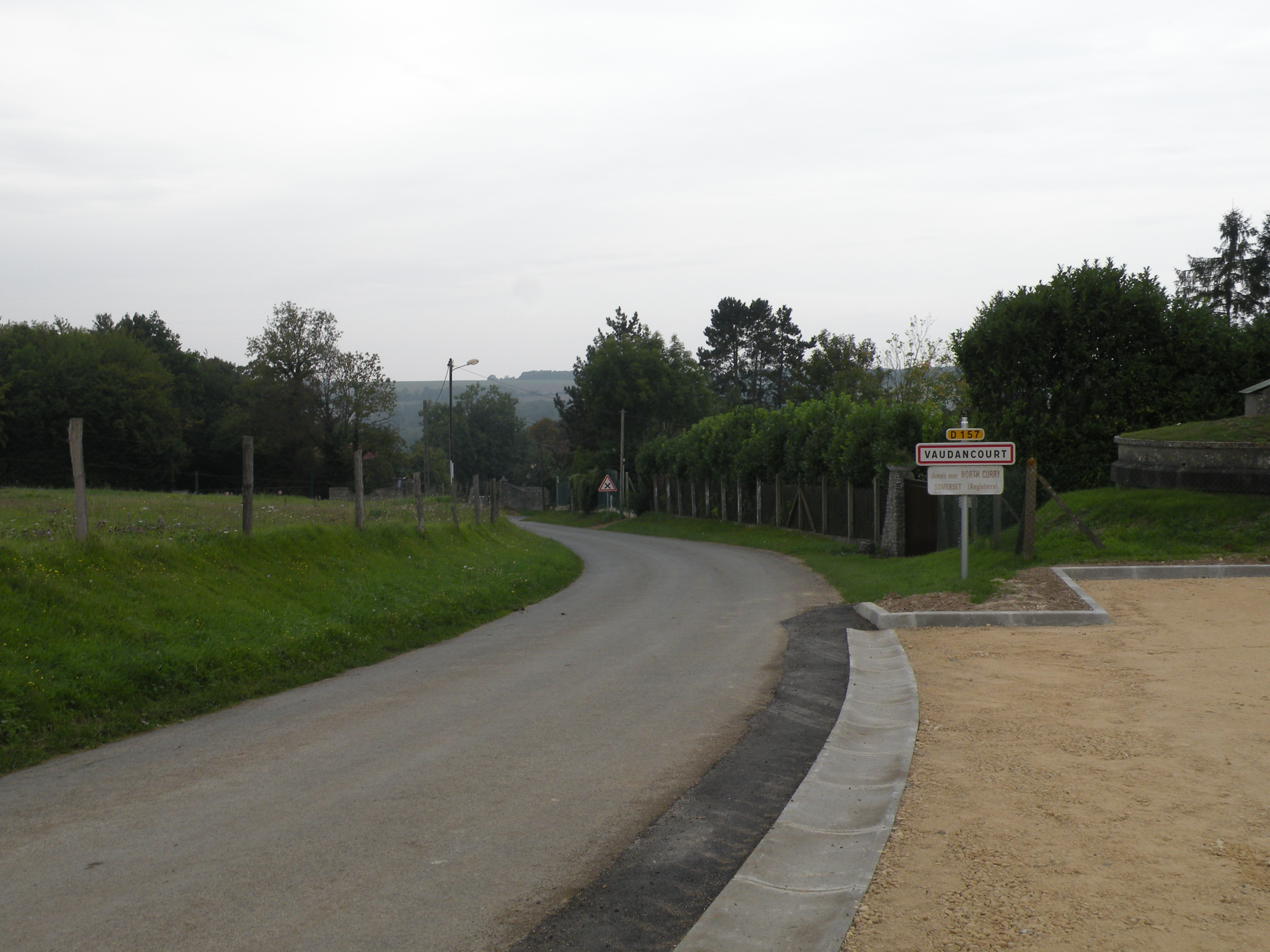 Vaudancourt rue